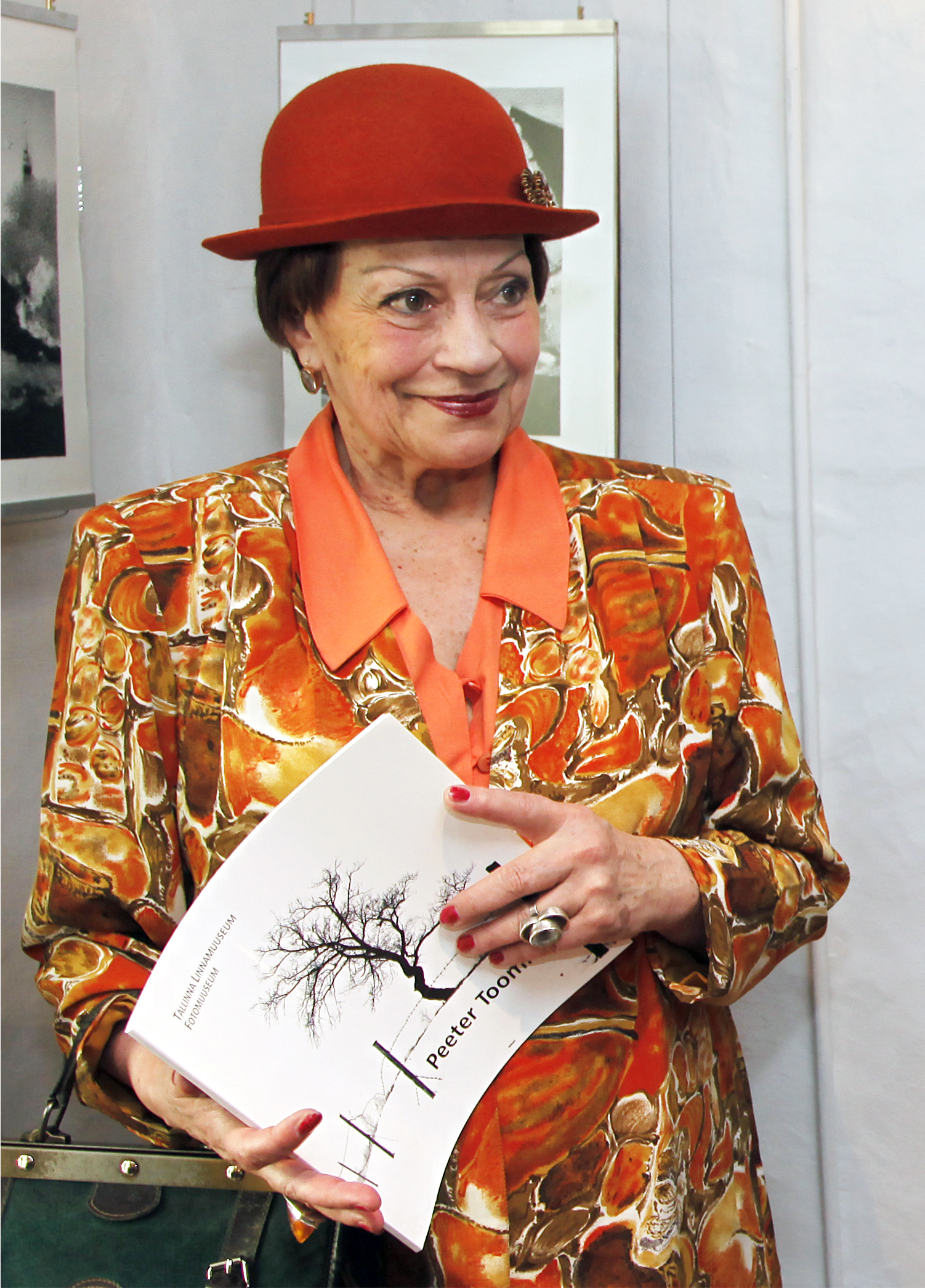 Elonna Spriit, Estonia teatris balletitantsija fotomuuseumis 2009